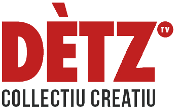 Logo Dètz